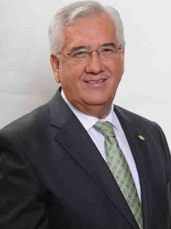 Carlos Alfredo Vilches Guzmán